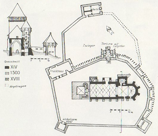 Planul fortificatiei din Iacobeni.